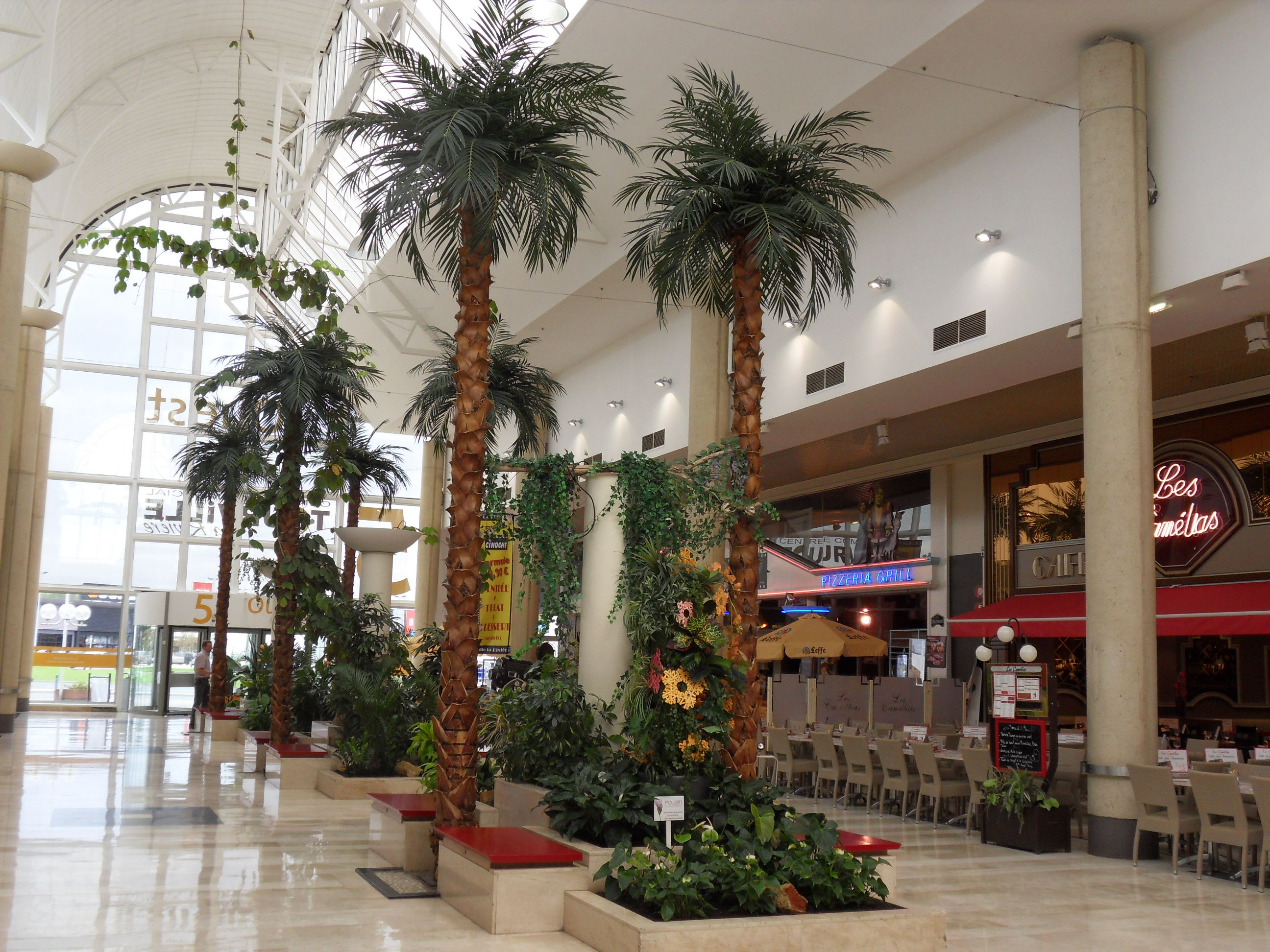 Espace détente au sein de la galerie du Centre Commerciale de Tourville-la-Rivière.